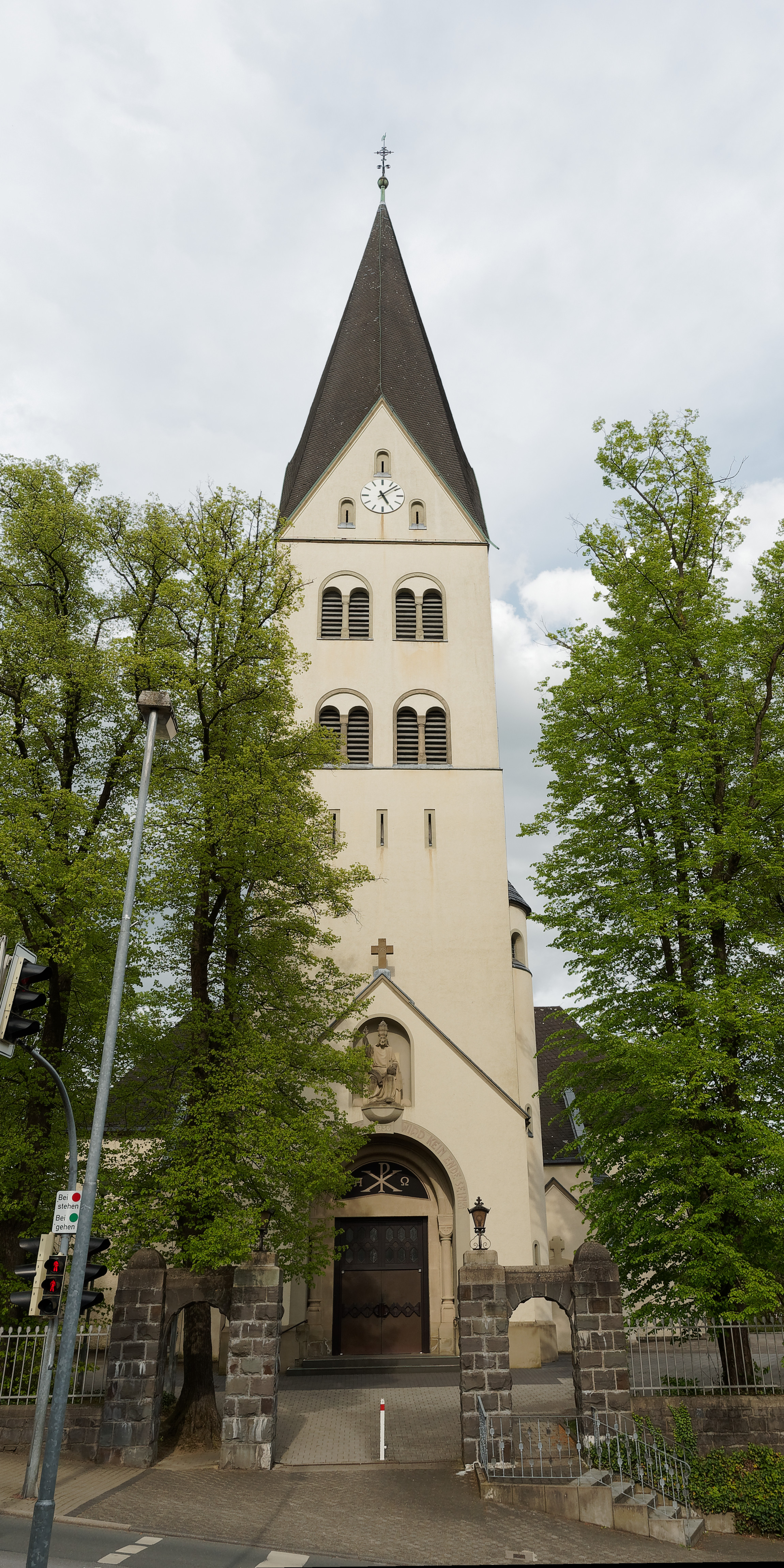 Turm mit Eingang in die Kirche St. Antonius von Padua in Wickede (Ruhr)